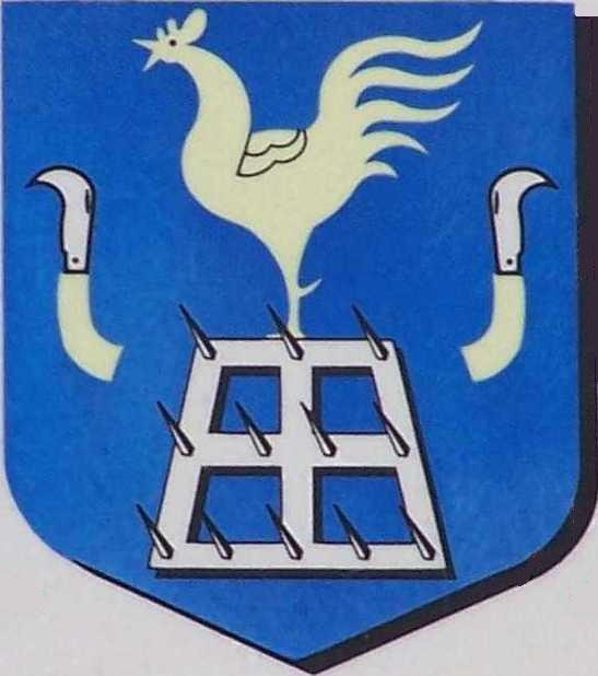 Blason de Galluis (Yvelines, France)